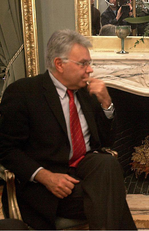 Felipe Gonzalez, ex-presidente de España.